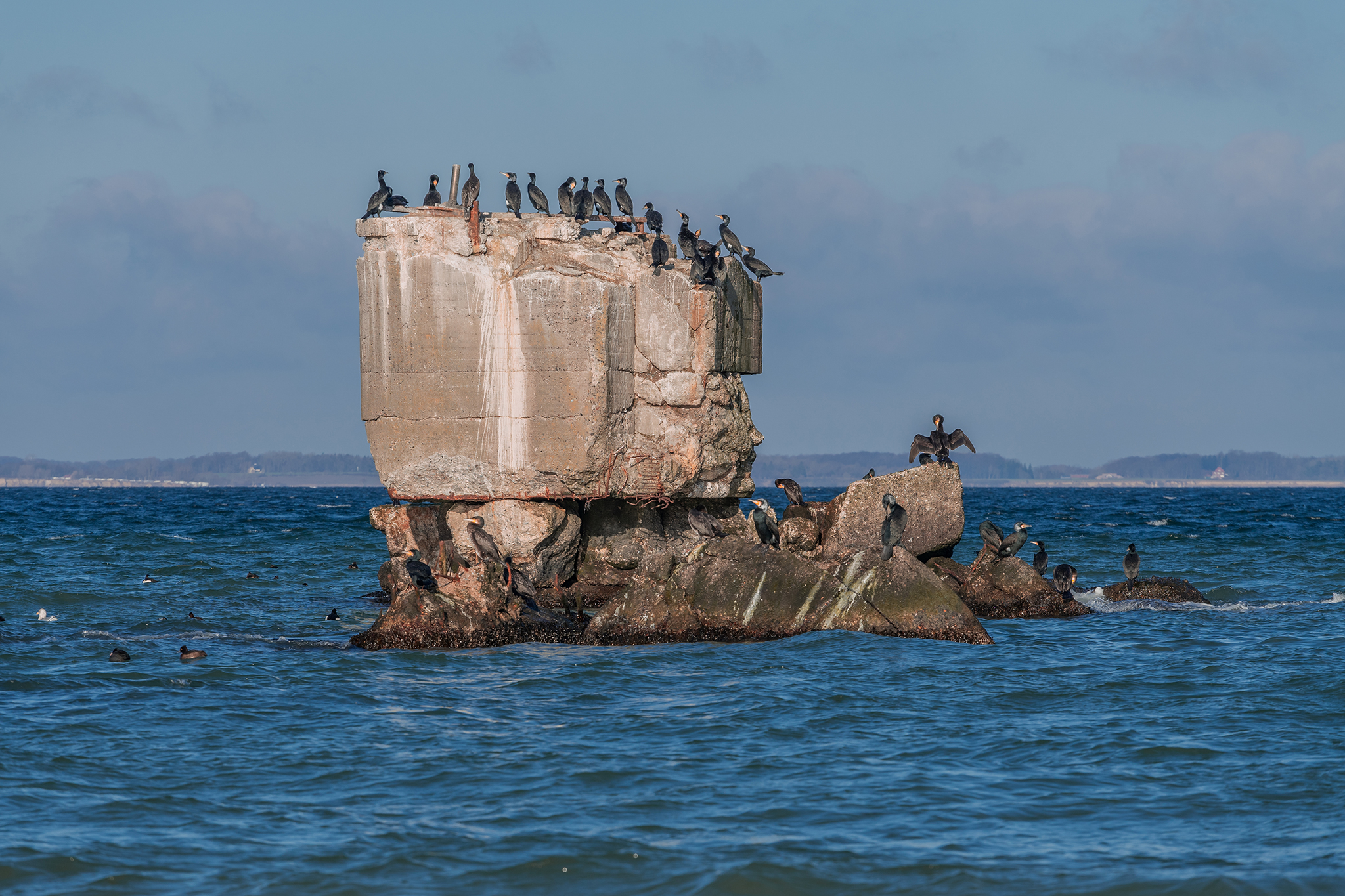 Ehemaliges Brückensegment der TVA Surendorf. Weitere Überreste befinden sich am Strand und unter Wasser.